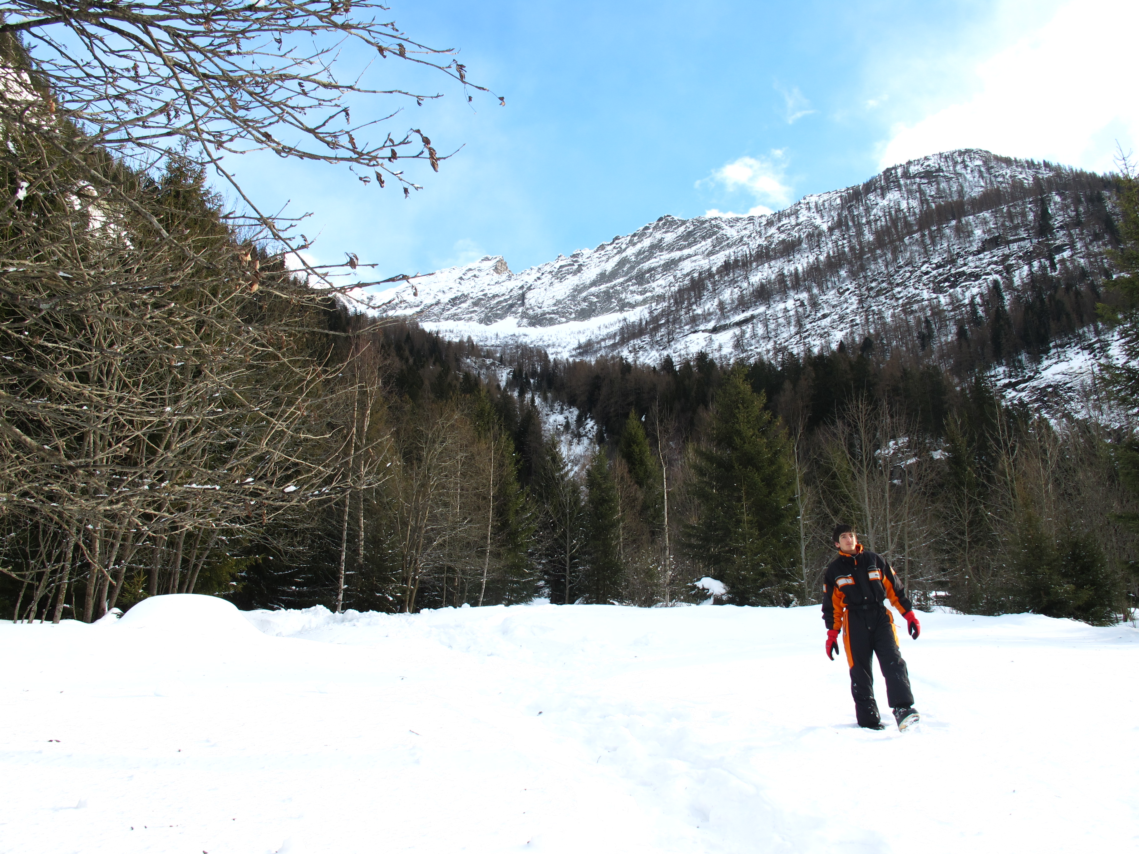 Vista della Val Formazza e dei suoi monti d'inverno.